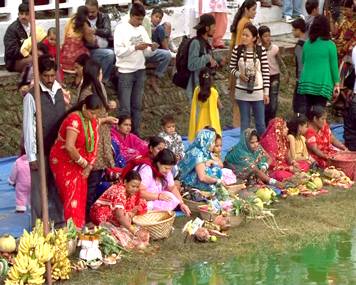 नेपाली: रानीपोखरीमा छठ